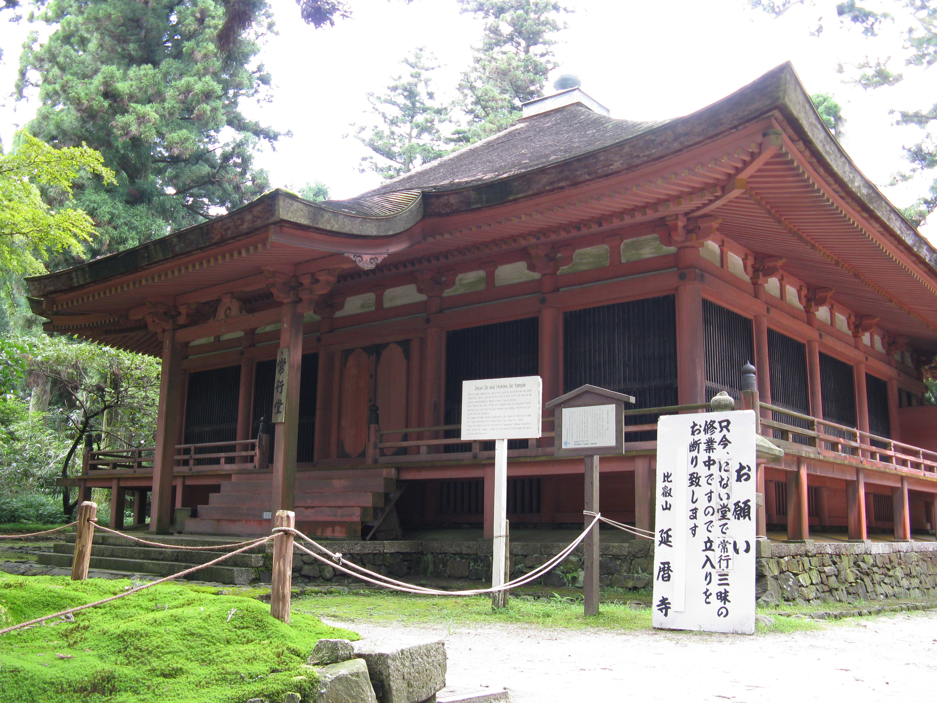 延暦寺 常行堂